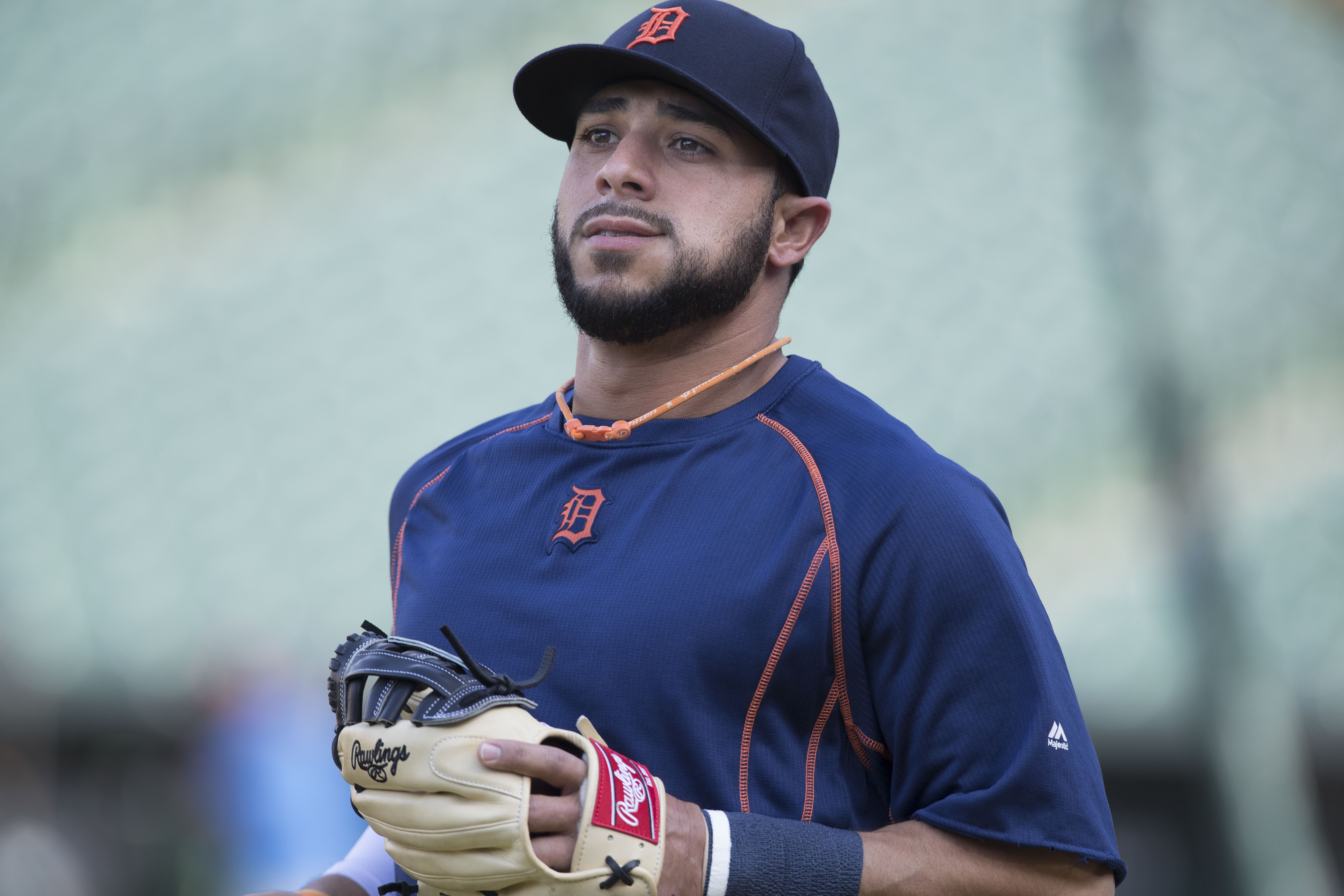 Mike Avilés